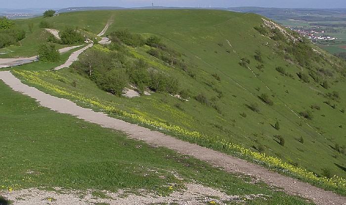 Die Osterwiese auf dem Hesselberg Fotograf: Oswald Engelhardt